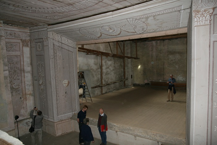 Feistritz am Wechsel Teatr na zamku - projekt Josef Kornhäusel